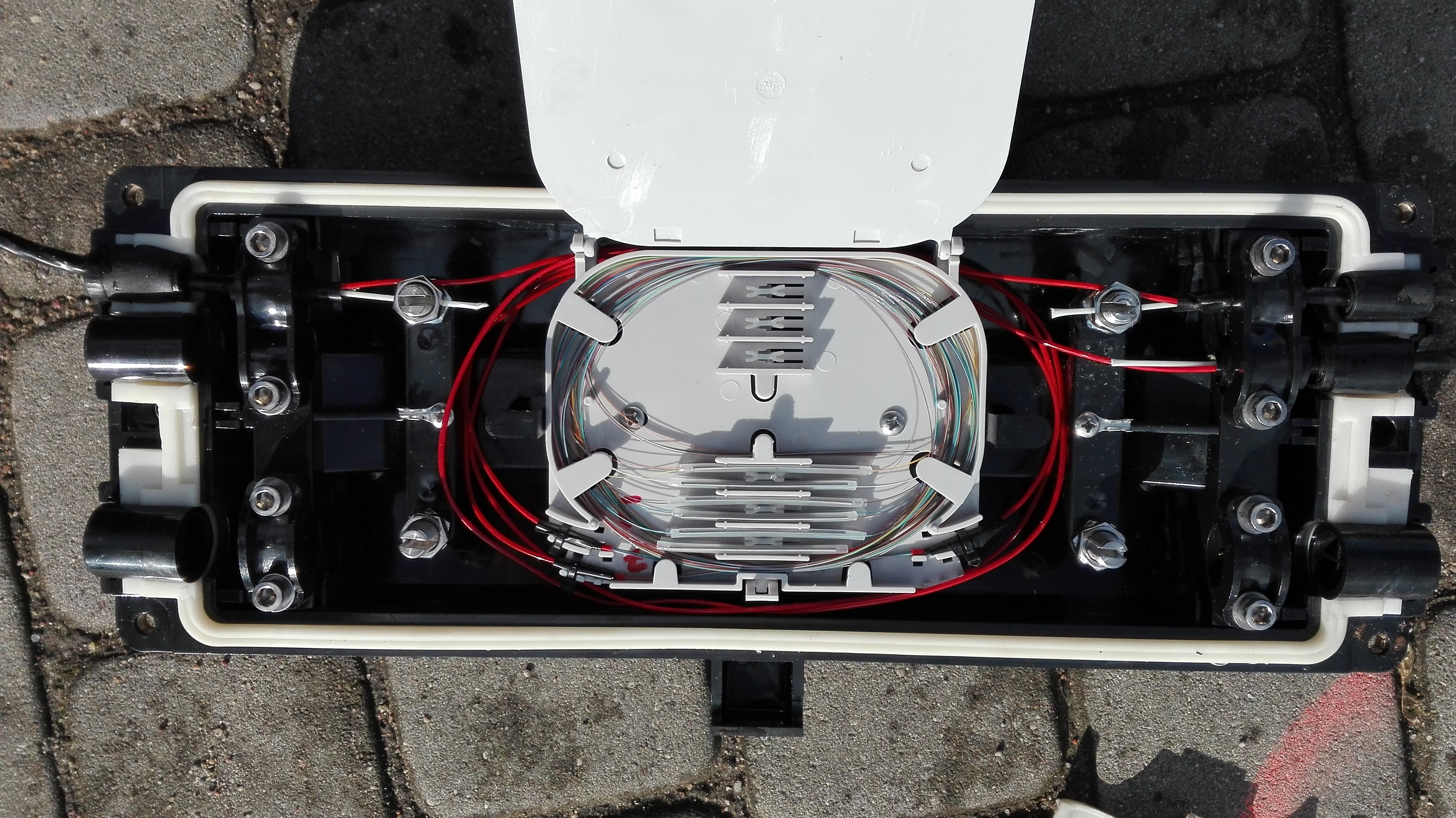 Mała mufa światłowodowa. Widoczna tacka (kaseta), i osłonki spawów (12 włókien).